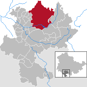 Schleusingen in Thuringia - district Hildburghausen